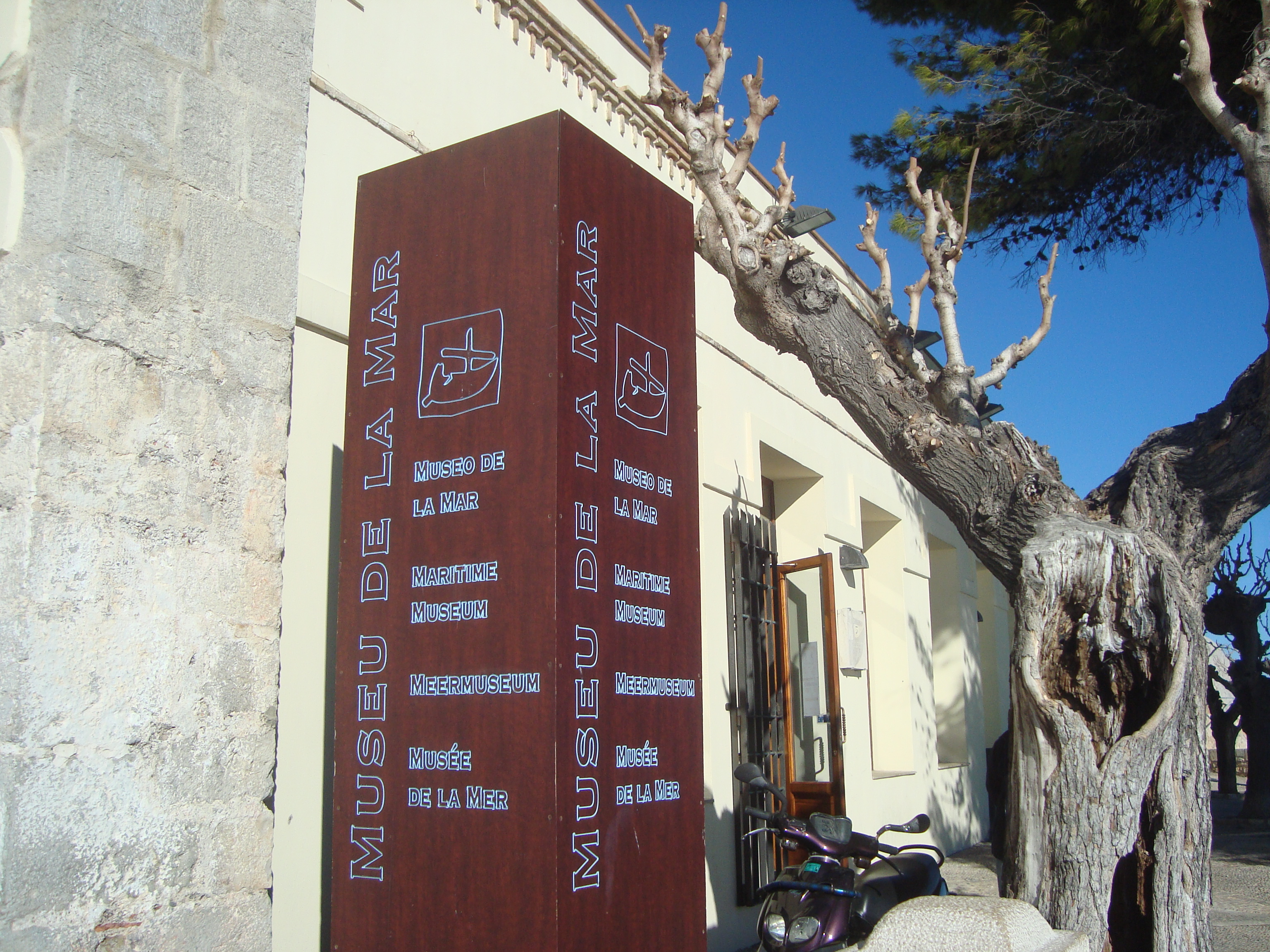 Edifici Les Costures (Peníscola) 03.089-031.